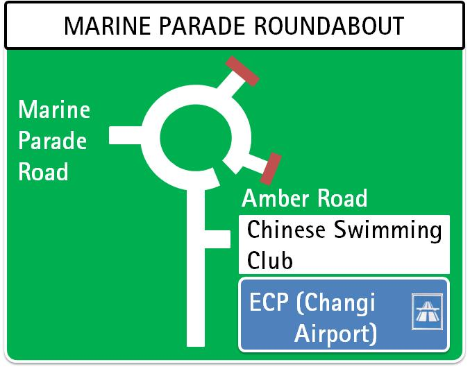 Road sign in Singapore